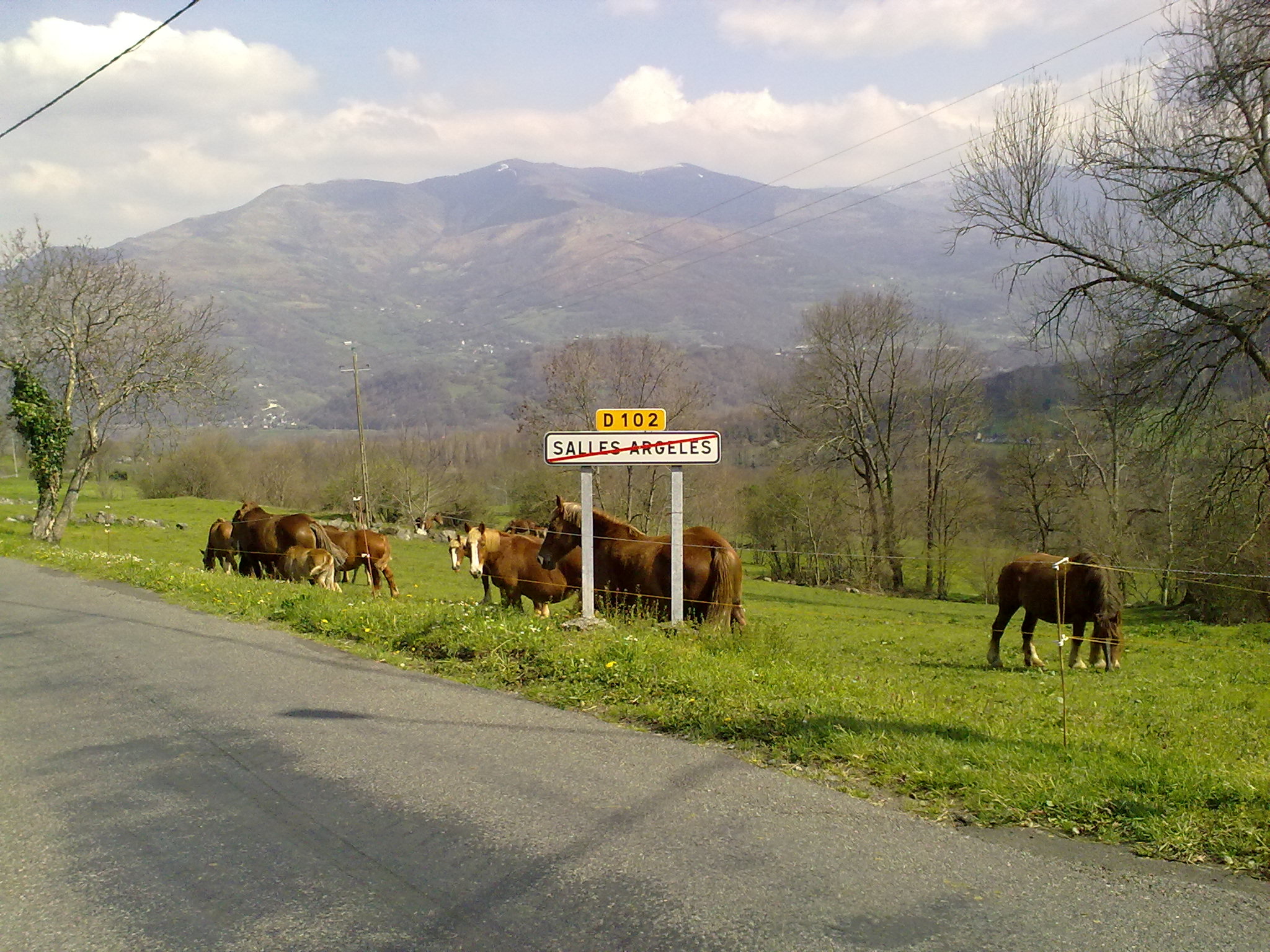 Salles, département 65, France